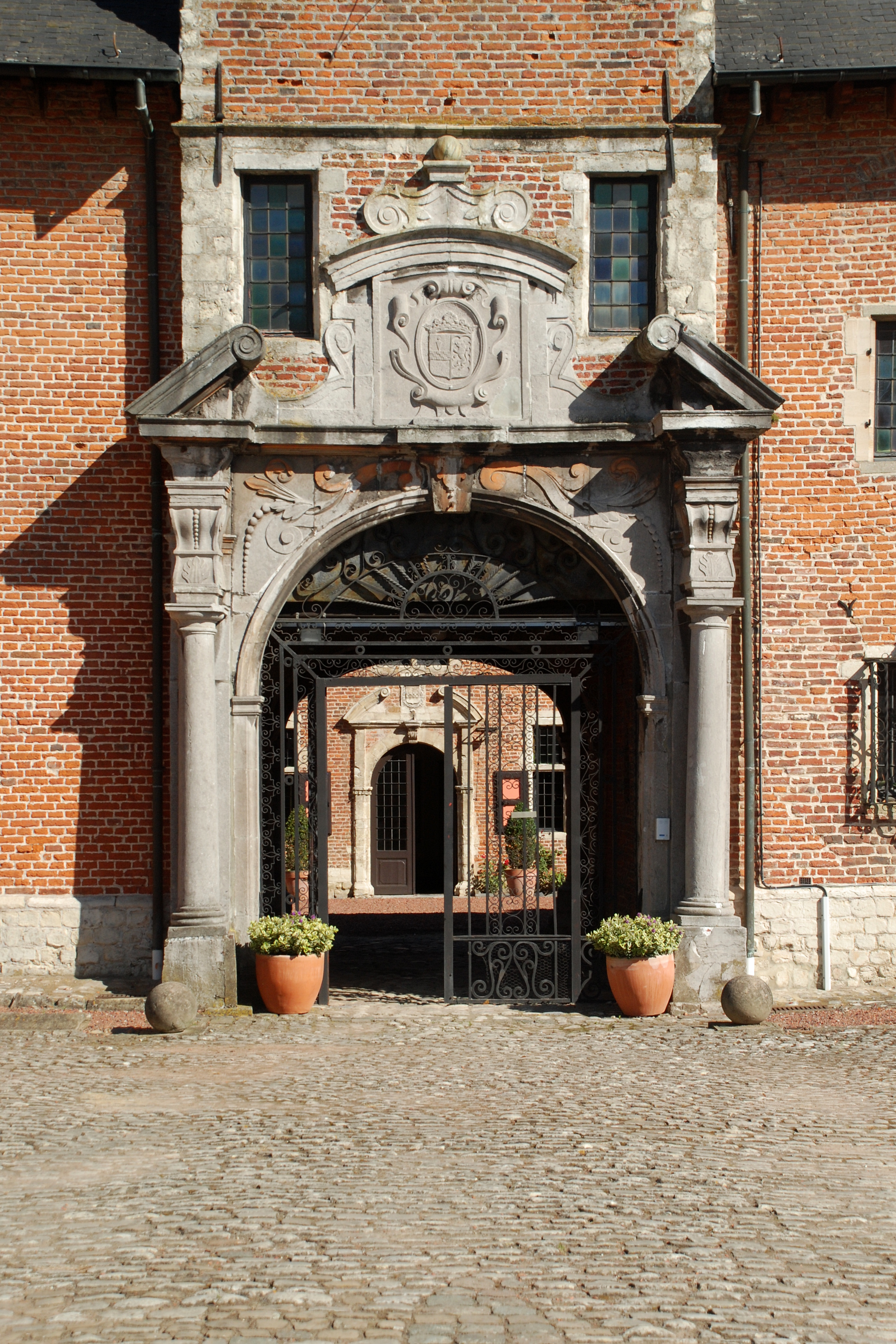 Belgique - Brabant wallon - Château de Rixensart